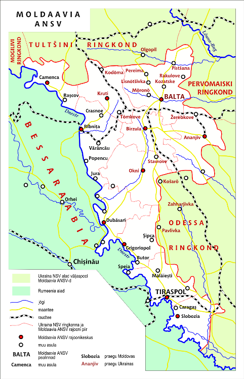 Moldaavia ANSV kaart